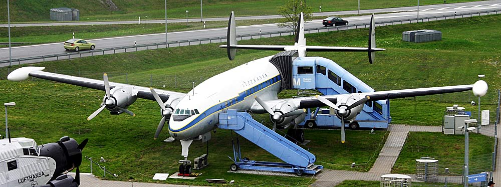 Aussengelände Münchner Flughafen